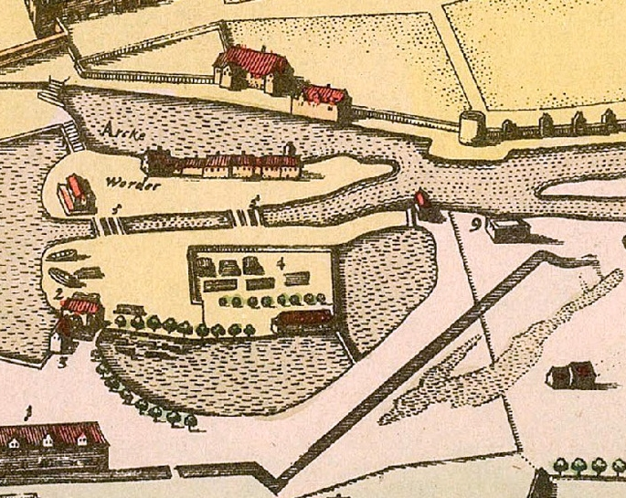 Lage des ehemaligen Berliner Ballhauses (Nr. 9)